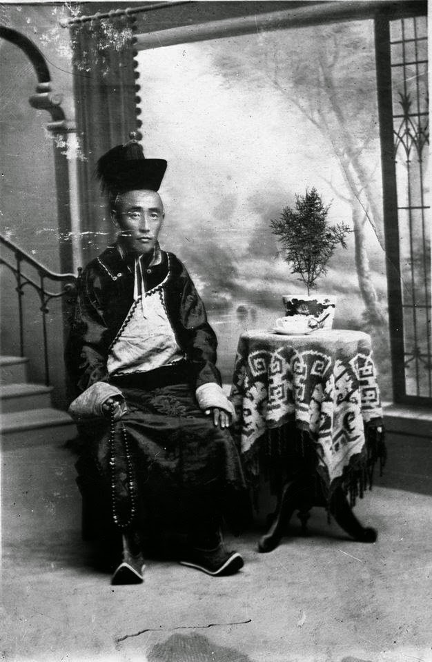 Монгол: Далай Чойнхор ван Г.Цэдэнсоном (1881-1930)